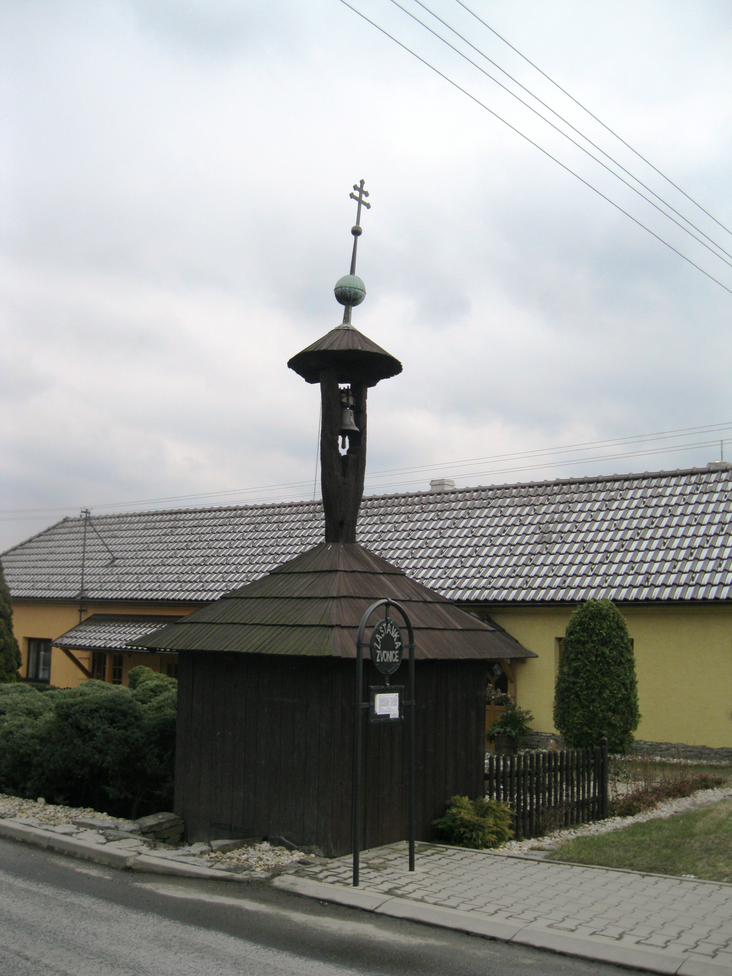 Zvonička (Hrabůvka), náves, Hrabůvka